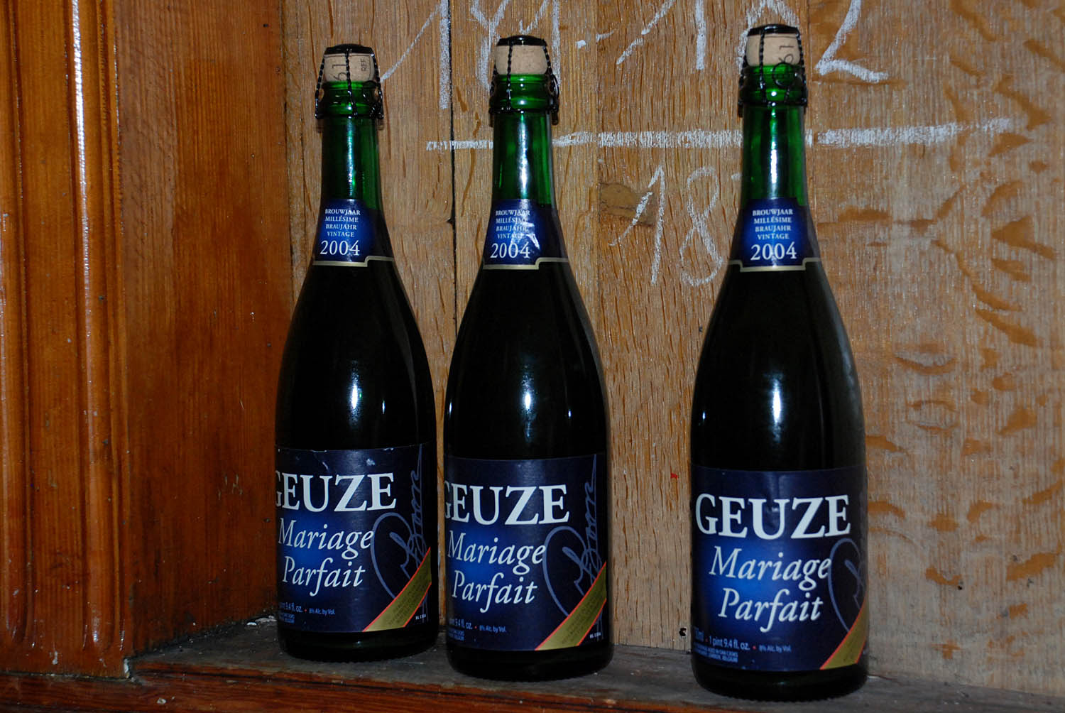 Geuze Mariage Parfait